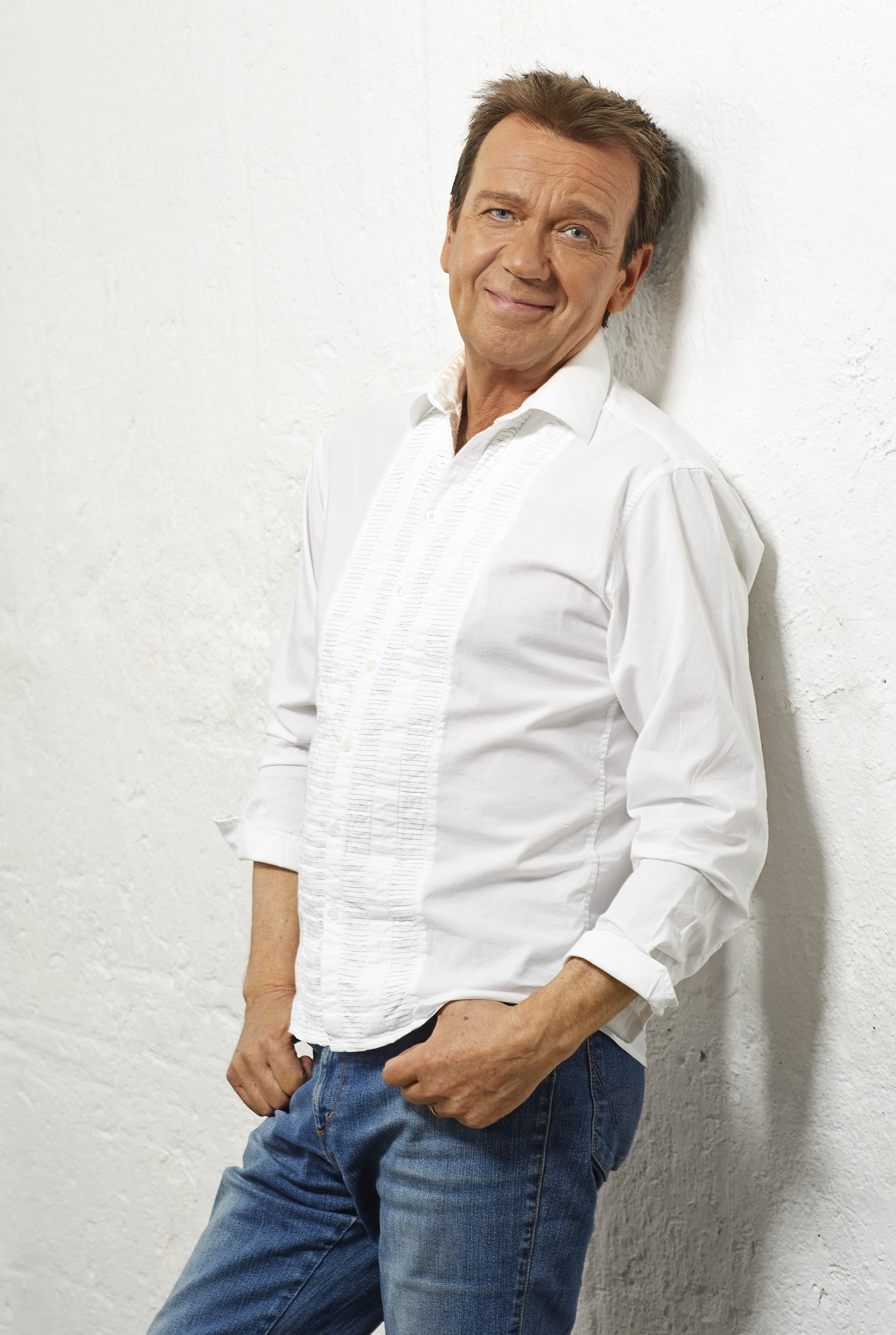 Artisten Björn Skifs.